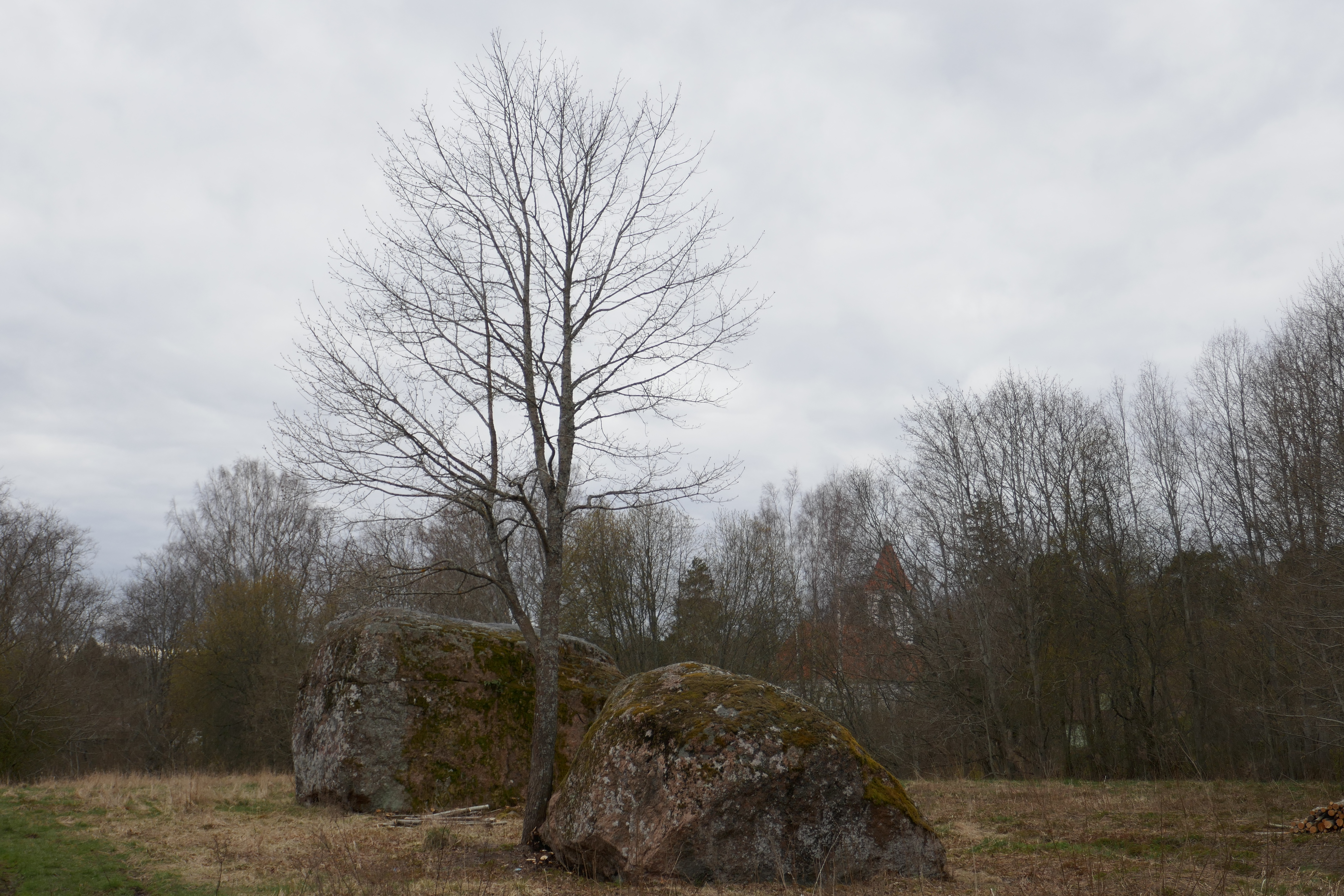 Loksal asuvad Mardimiku kivid 2020. aasta aprillis. Tagant paistab Loksa kirik.